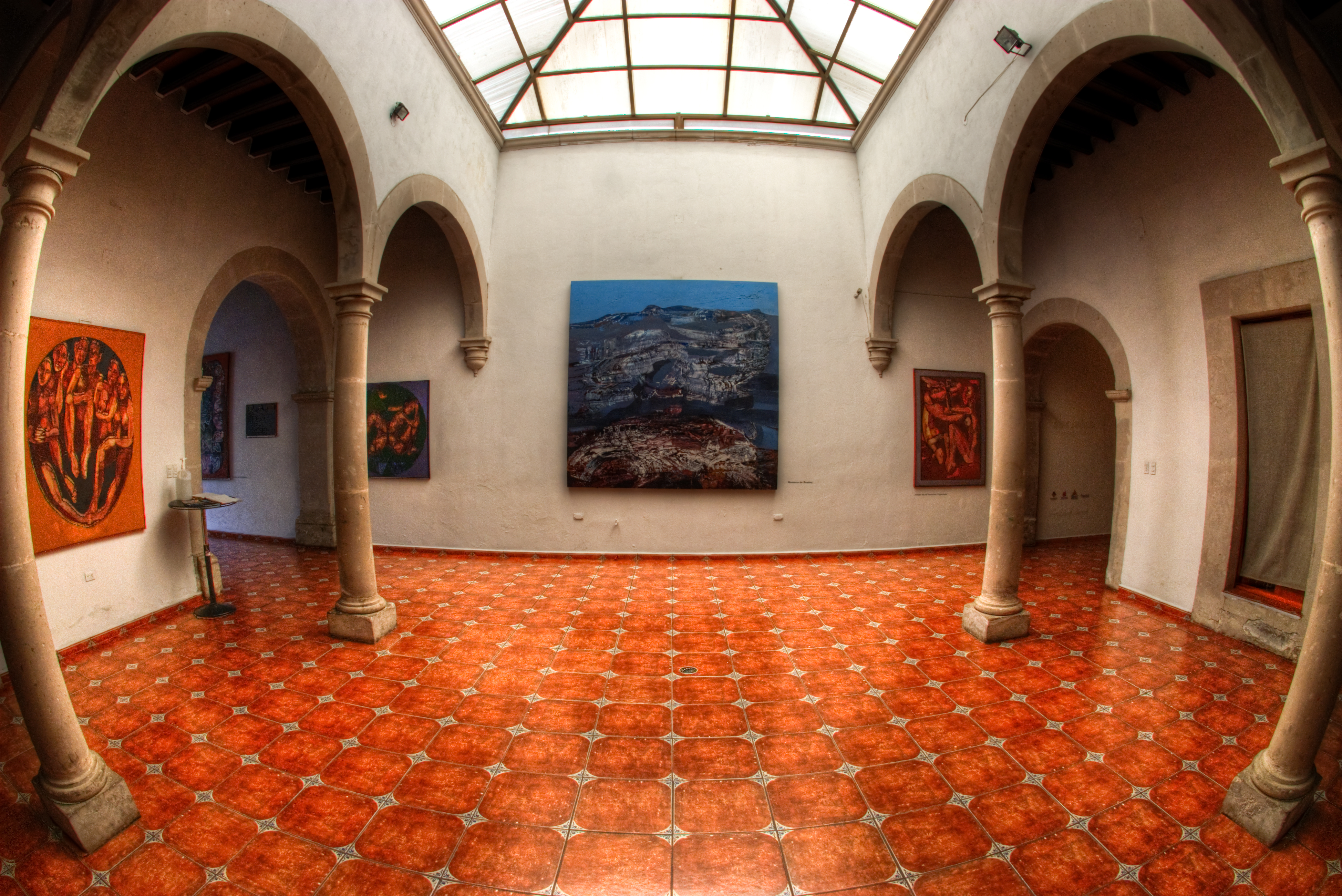 Superó mis expectativas, me gustó mucho el trabajo de Ceniceros, no lo conocía. También tienen una exposición de intervenciones de artistas plásticos sobre fotografías muy interesante (que incluye una foto de Valtierra).